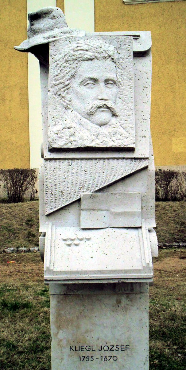 Kliegl József szobra Baján. Kligl Sándor alkotása. – photo taken by uploader User:Csanády in 2006.